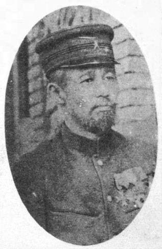 a Japanese man 森鴎外 (Ogai Mori)